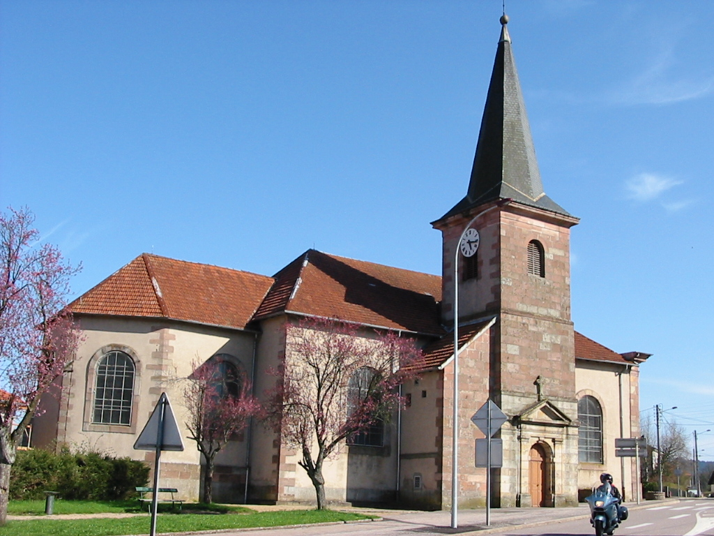 Brouvelieures Commune des Vosges L'église Sainte-Croix Photographie personnelle, prise le 23 avril 2006 Copyright © Christian Amet